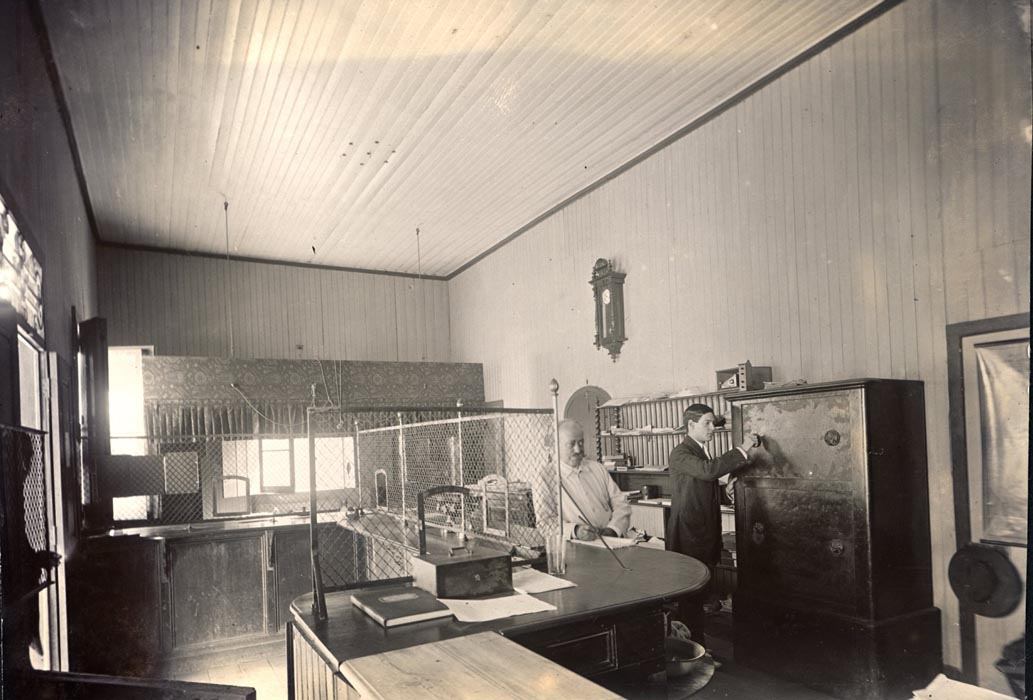 Fazenda. Tesouraria Geral